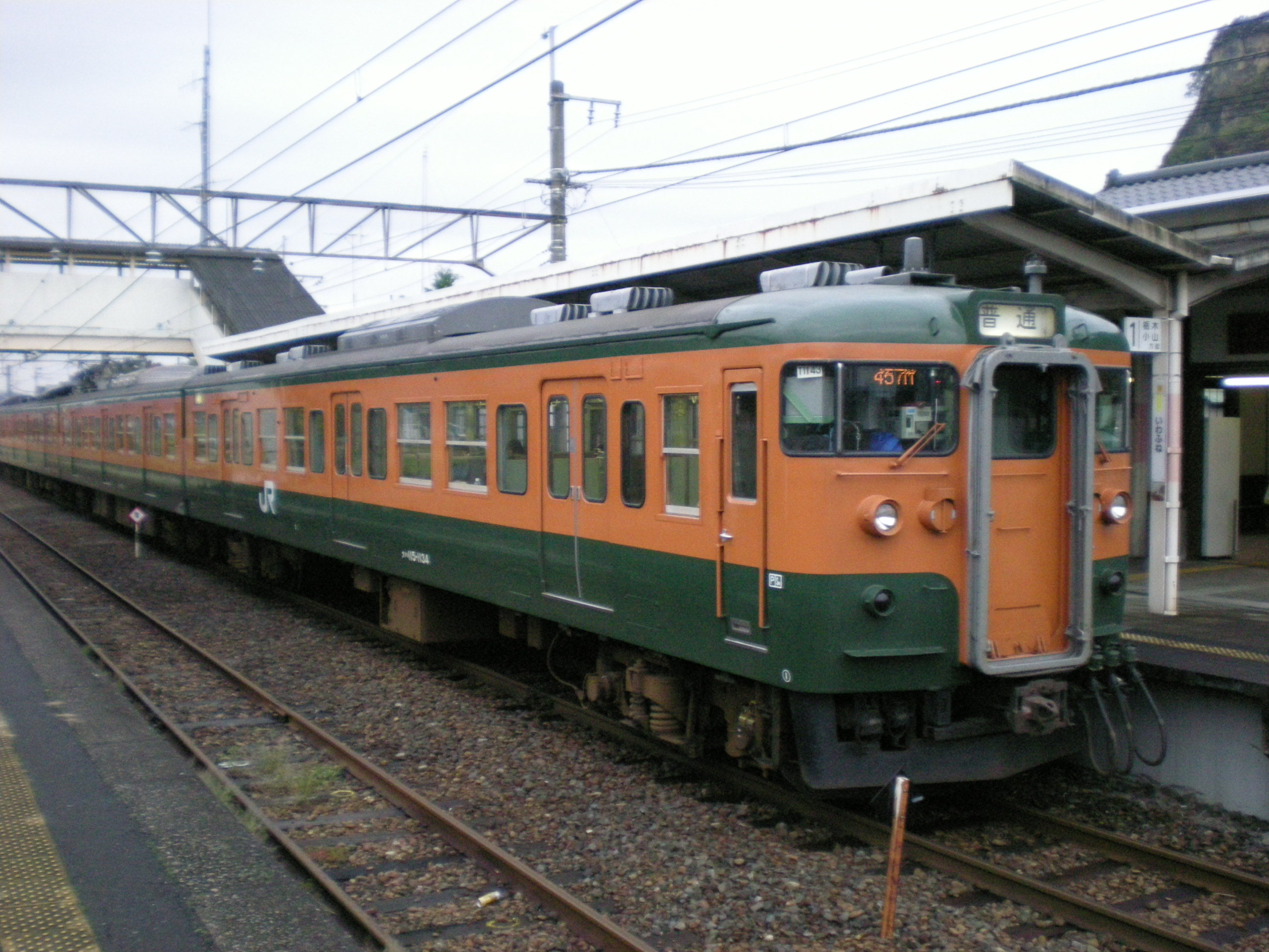 Byosoku 5 cm Episode 01 description 01